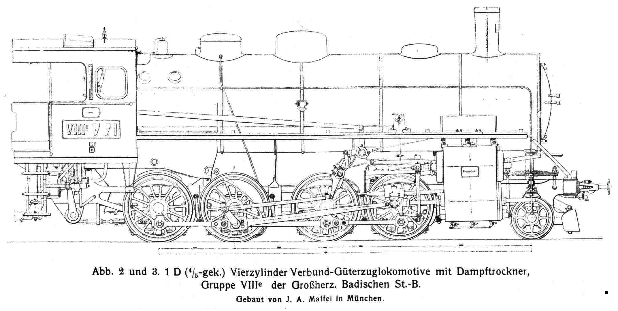 Dampflokomotive Badische VIII e.